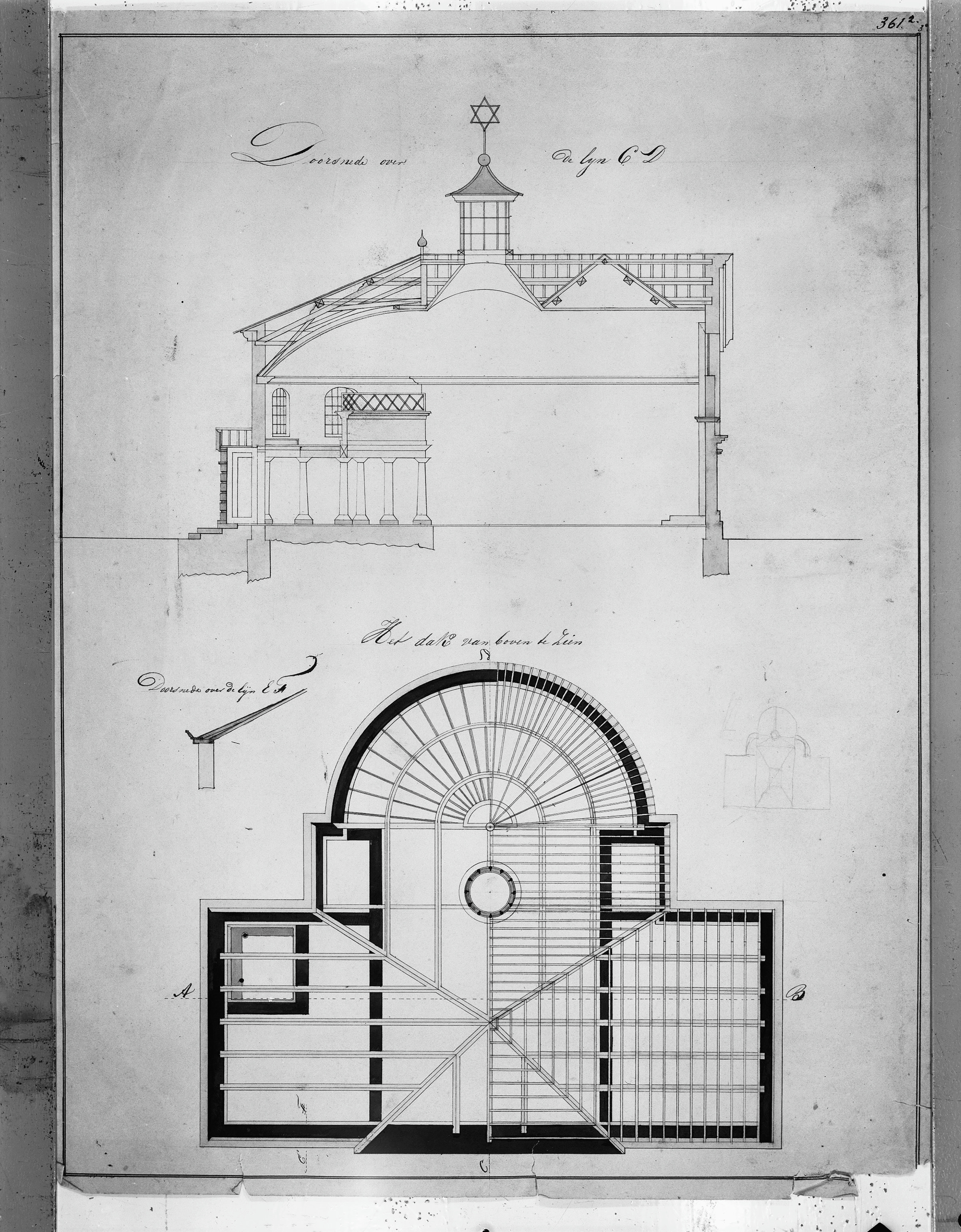 Synagoge: Israëlische Genootschap tekening in het bezit van Rijksarchief